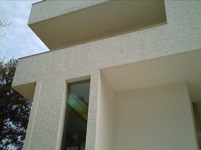 Casa museo Remo Brindisi This is a photo of a monument which is part of cultural heritage of Italy.